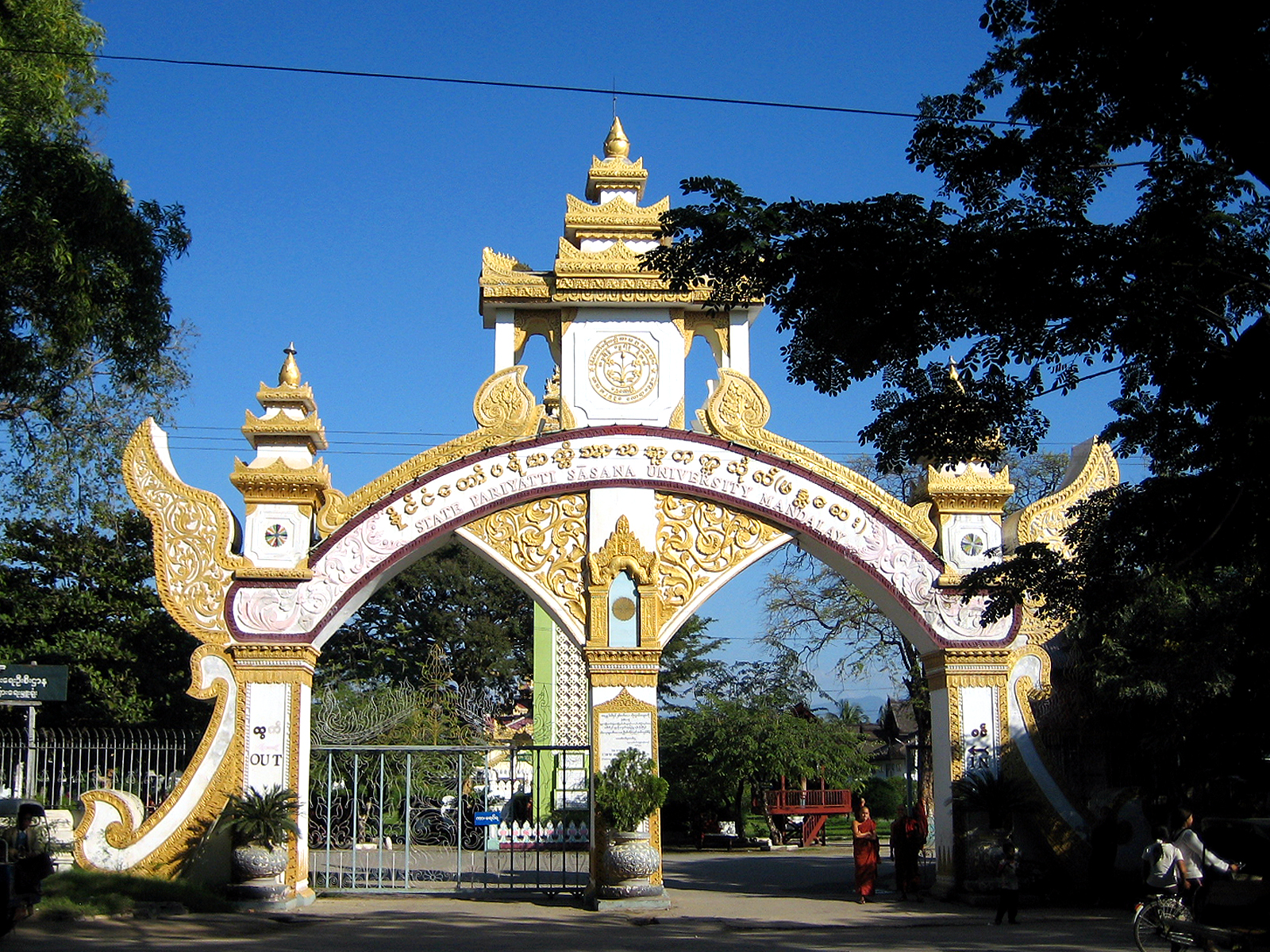 Pariyatti Sasana University, Mandalay, Myanmar